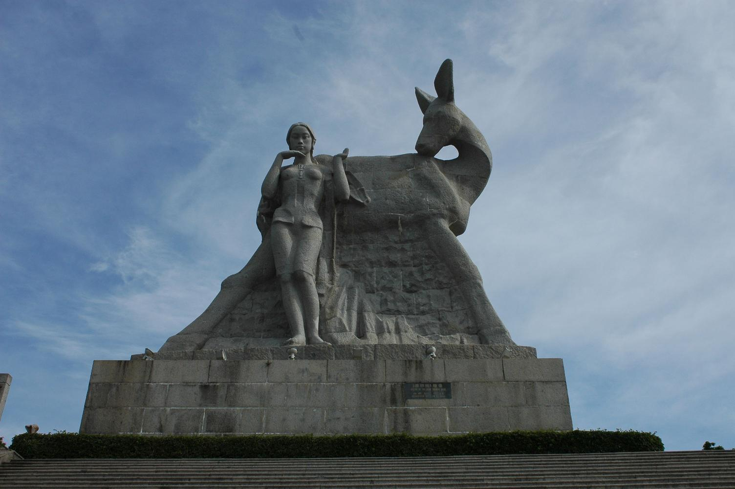 海南三亚鹿回头雕塑